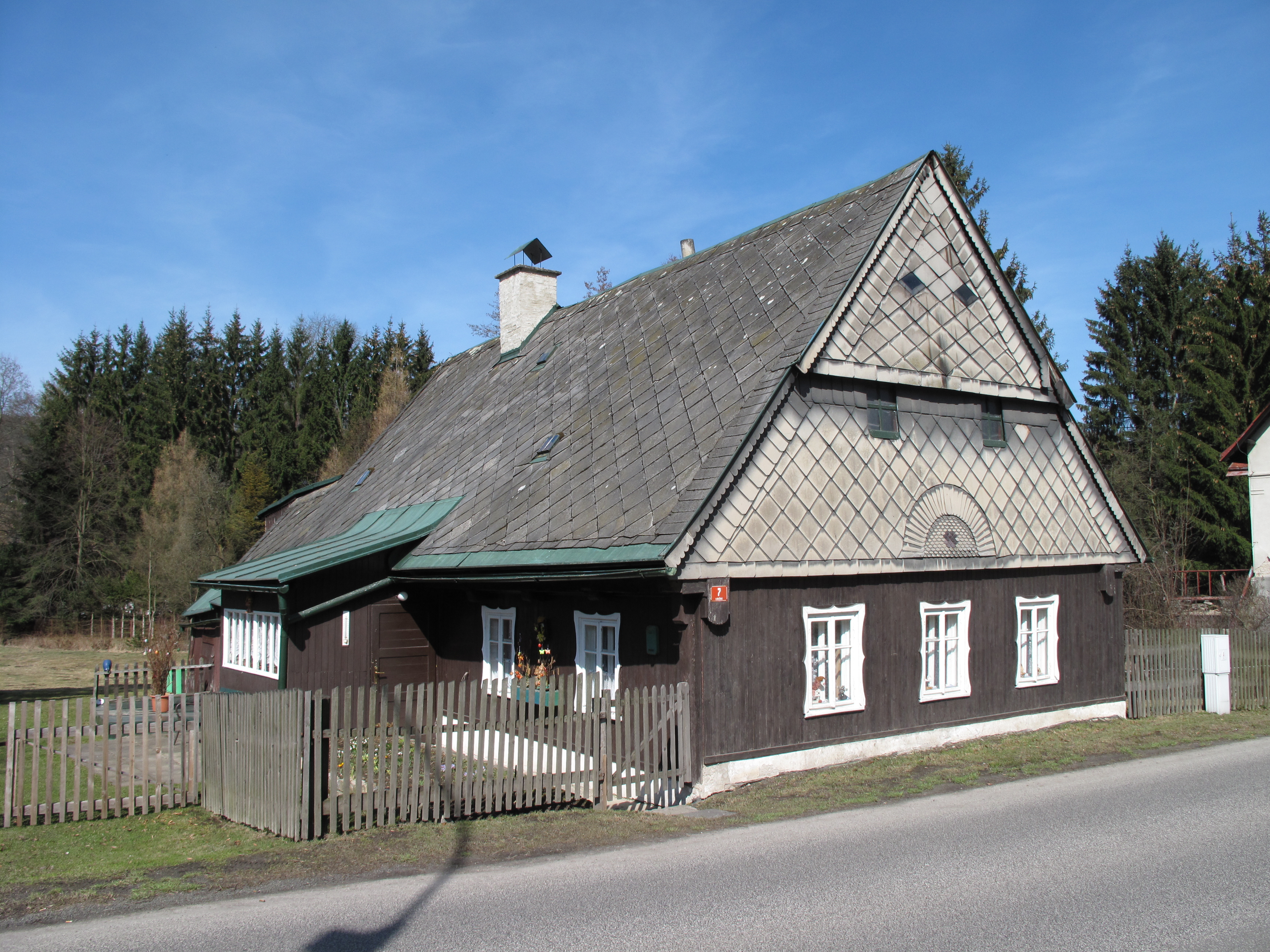 Roubenka v Loučné nad Nisou. Okres Jablonec nad Nisou, Česká republika.